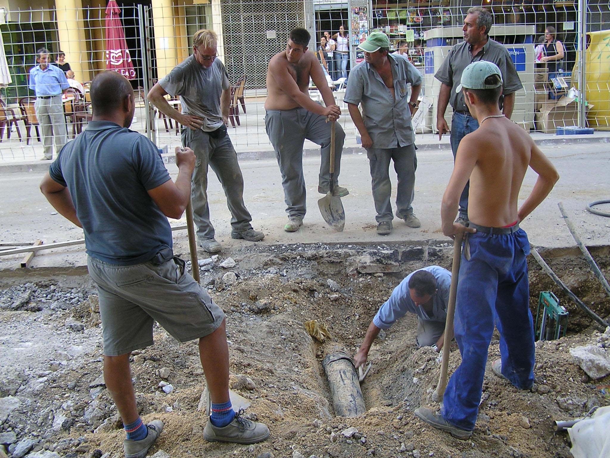 7 trabajadores arreglando un escape de gas, en Alcalá la Real, Jaén, España.